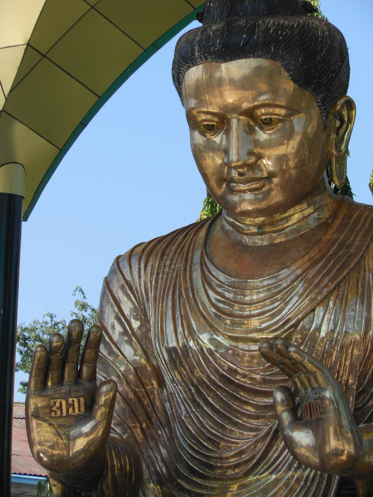 Almost Feminine Buddha